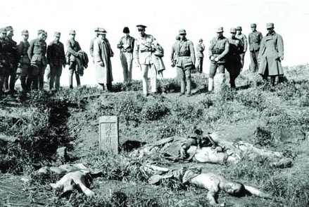 日军撤退丢下大片尸体